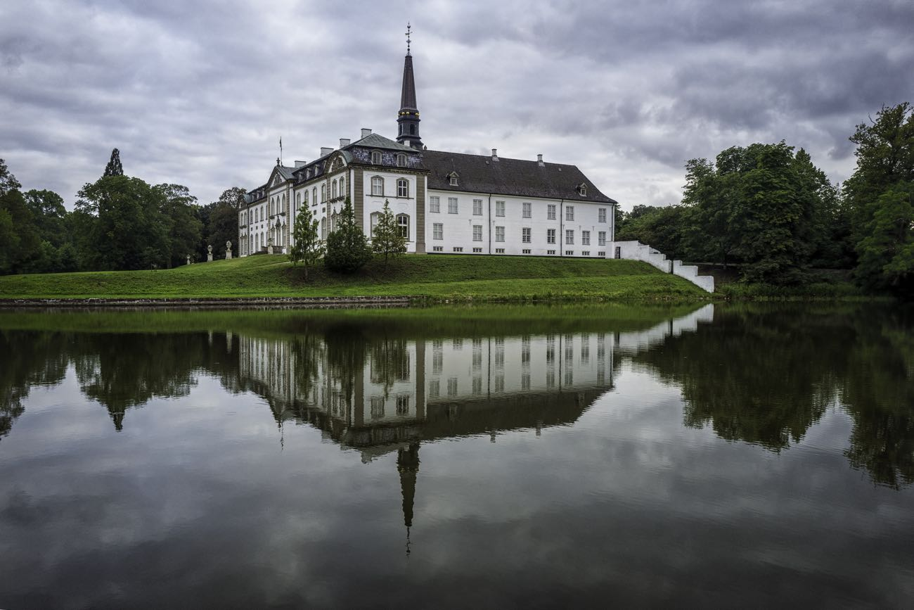 Bregentved at Haslev, Denmark